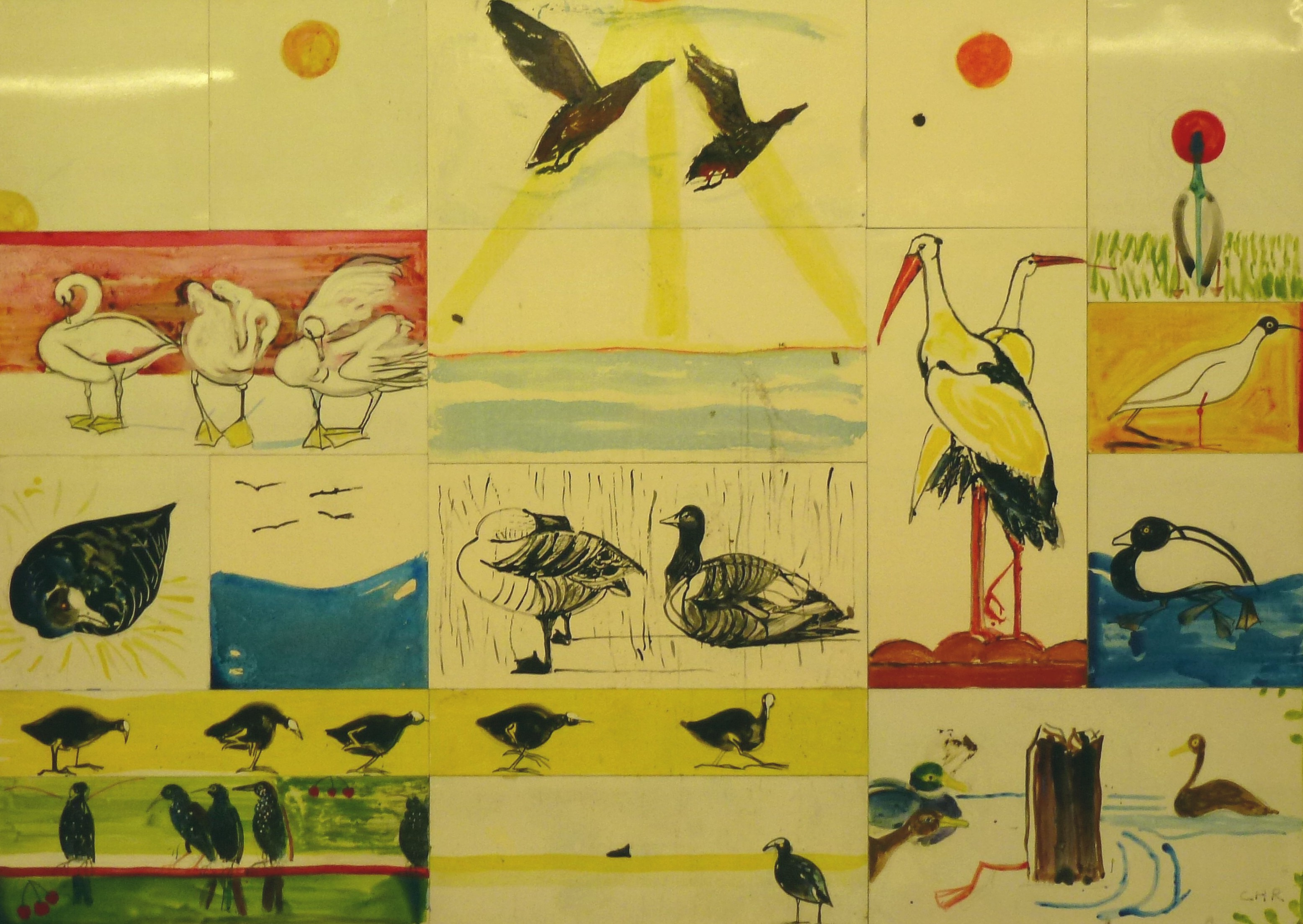 Christina Rundqvist-Anderssons "Sjöfåglar"